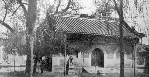 嵩祝寺山门